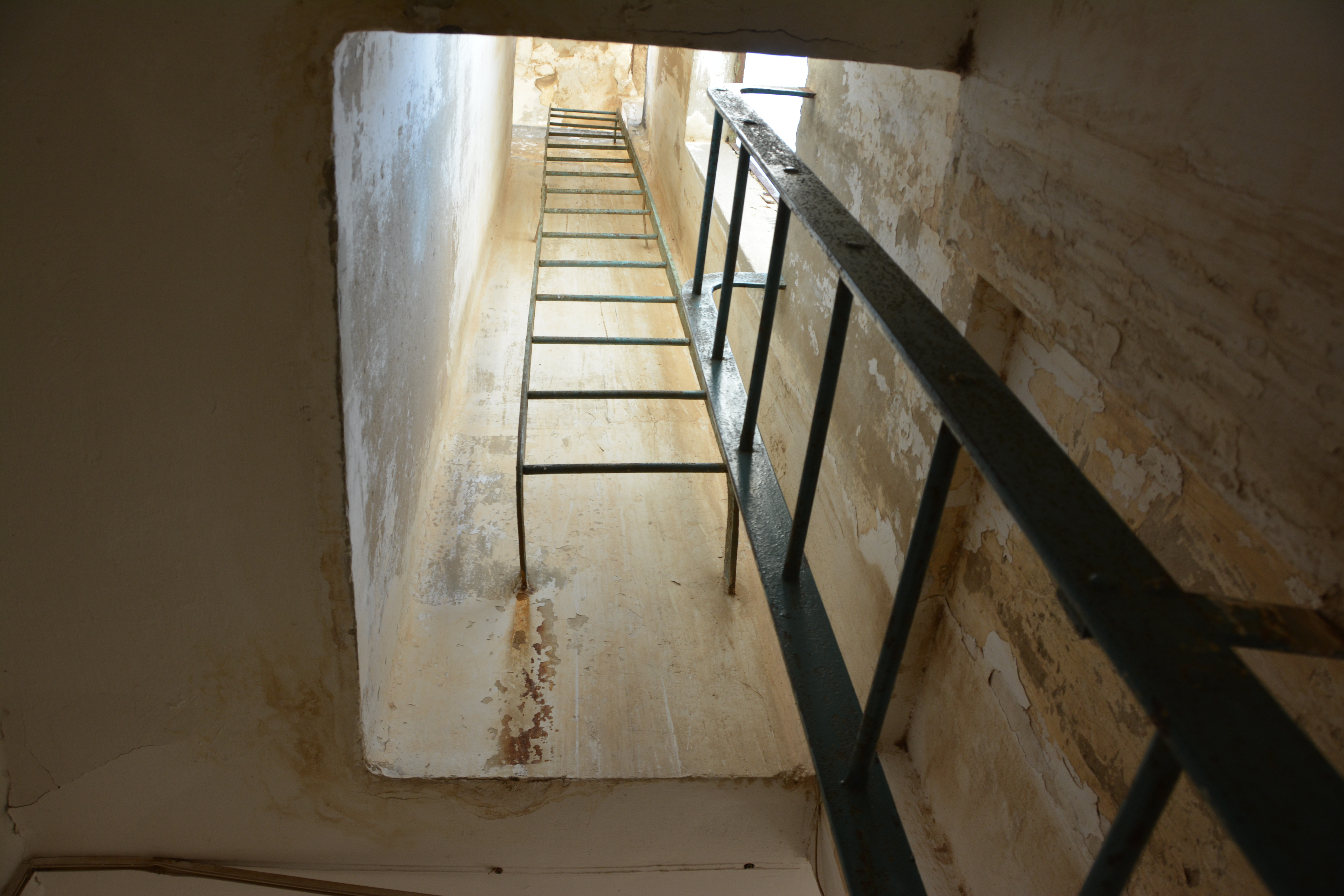 מחנה ישראל (דברת) היה קומונה של פועלי אגודת ישראל שהתארגנה לקראת חיי קיבוץ. אנשי הקבוצה התיישבו על אדמה שנרכשה בשנת 1925 בעמק יזרעאל, ליד קיבוץ דברת של היום.